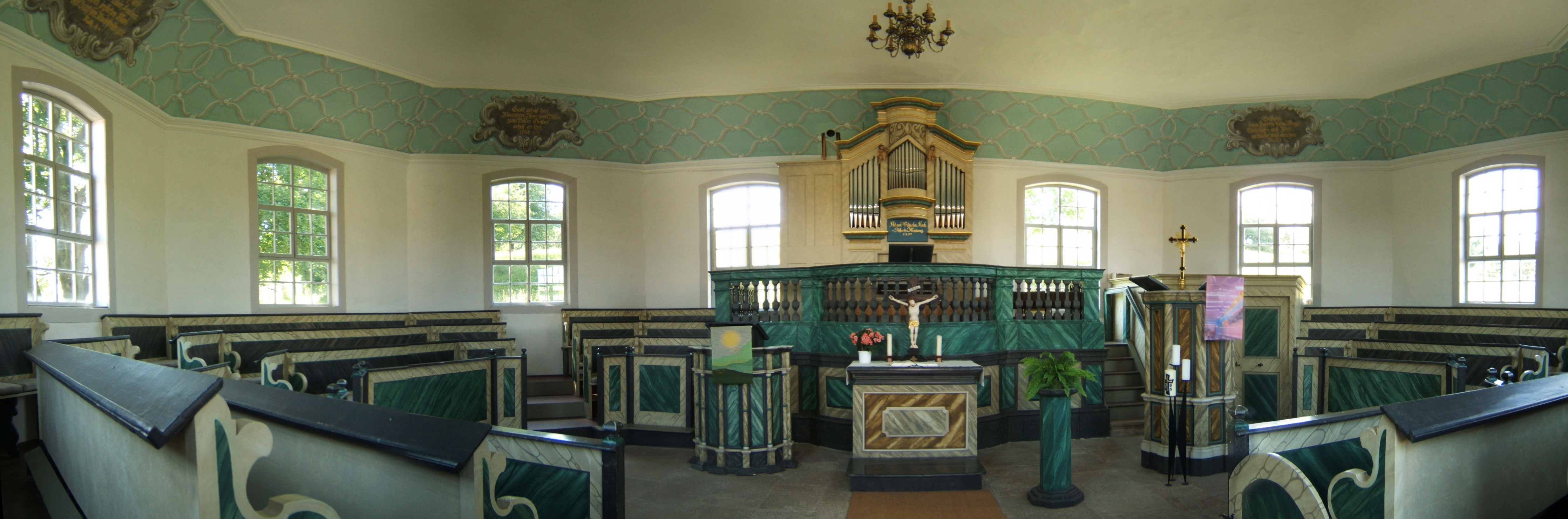 Achteckige Kirche in Geba